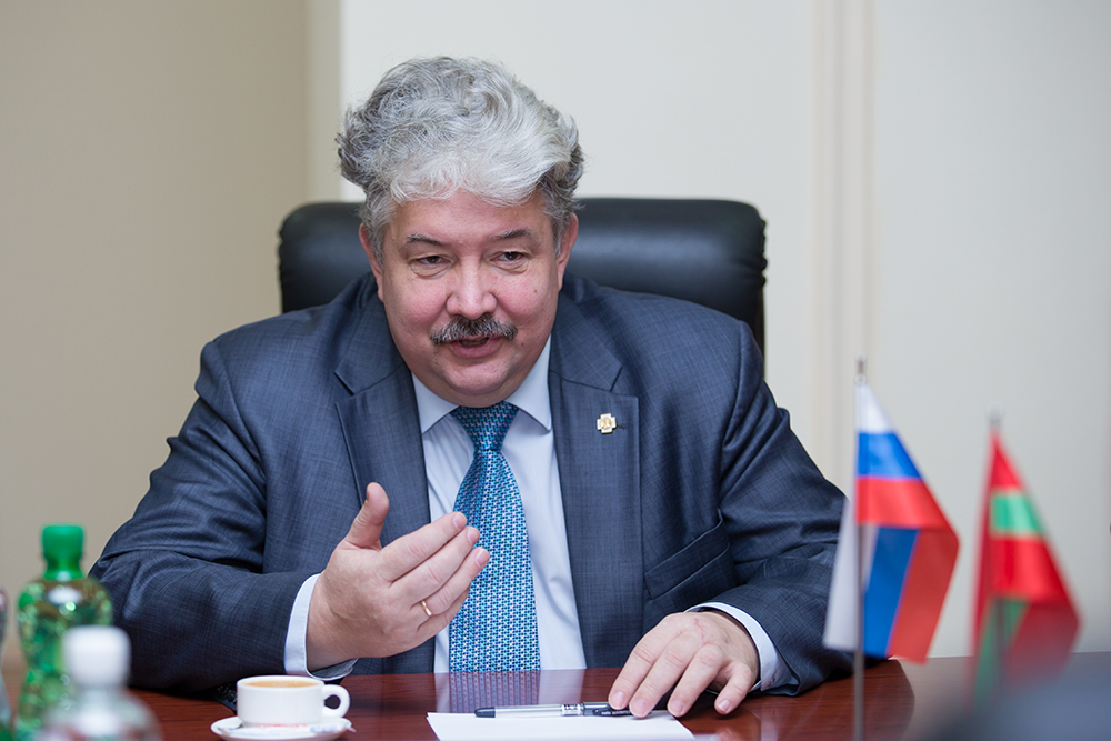 Бабурин Сергей Николаевич - российский политический, государственный и научный деятель.